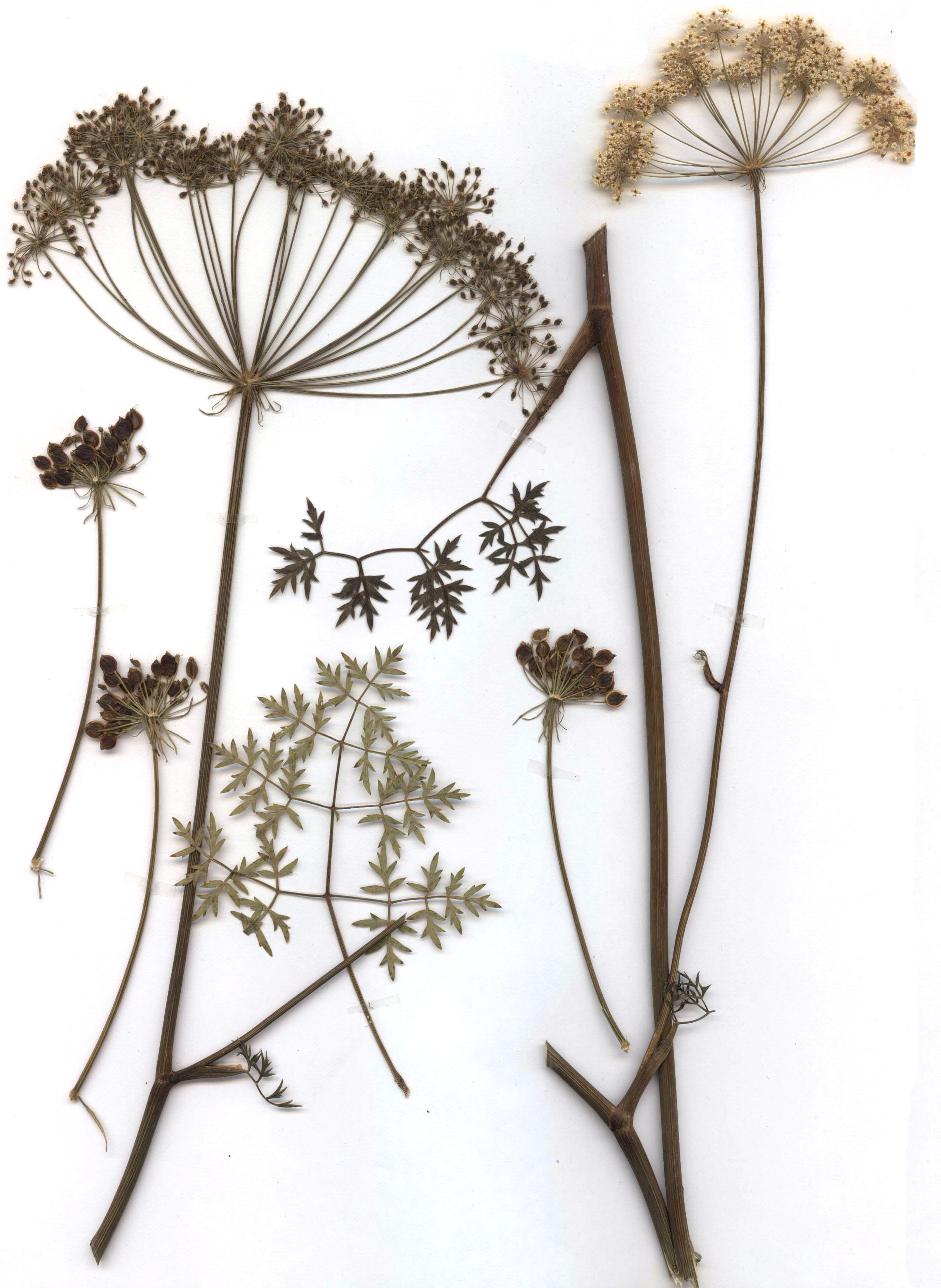 Peucedanum oreoselinum, eigener Herbarbeleg von 1982, Unterfranken